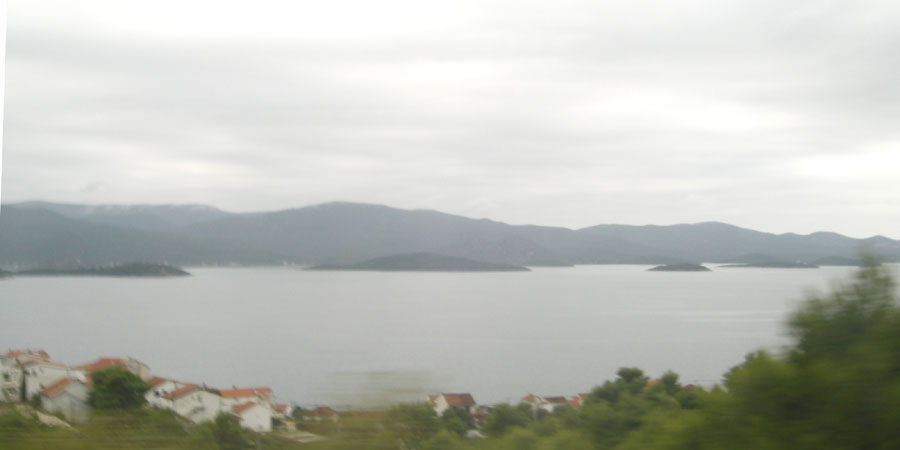 Willage of Komarna (close), Pelješac peninsula, headland Blaca (Pelješac), island (left to right) of Tajan, Pučenjak, Lovorikovac, Dubovac (barely visible)